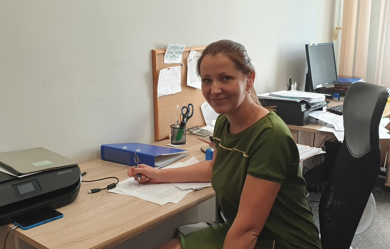 Stargard. PGE Spójnia Stargard. Katarzyna Piątek